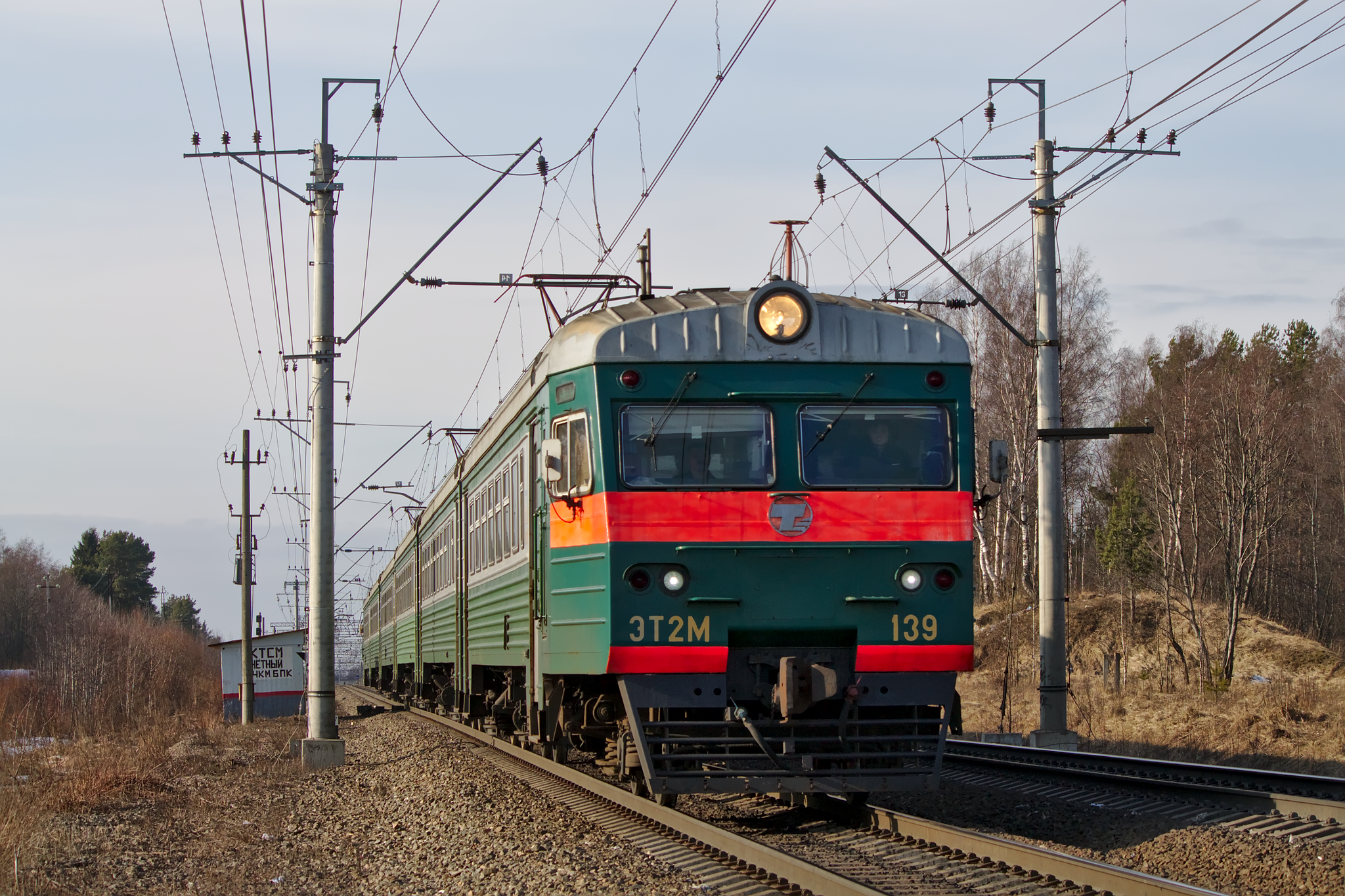 ЭТ2М-139, Горы - Мга. см. фото 586507 в альбоме автора